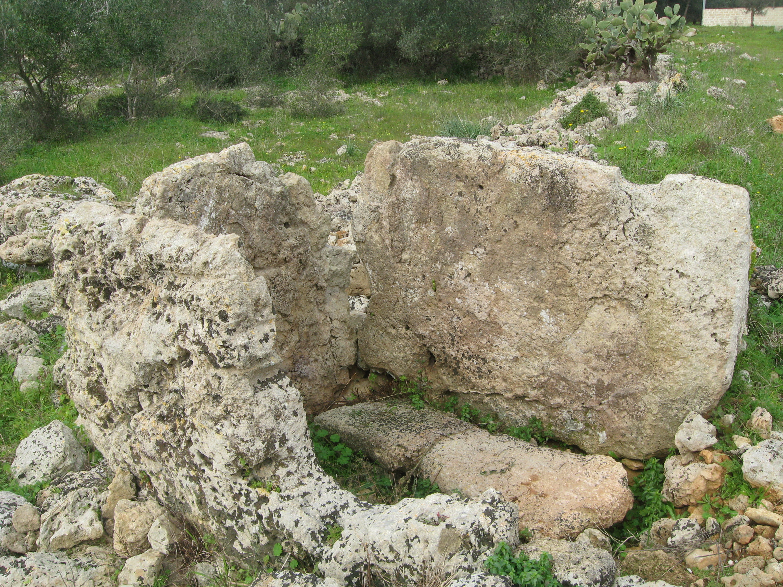 Le tre lastre che compongono il dolmen di Racale